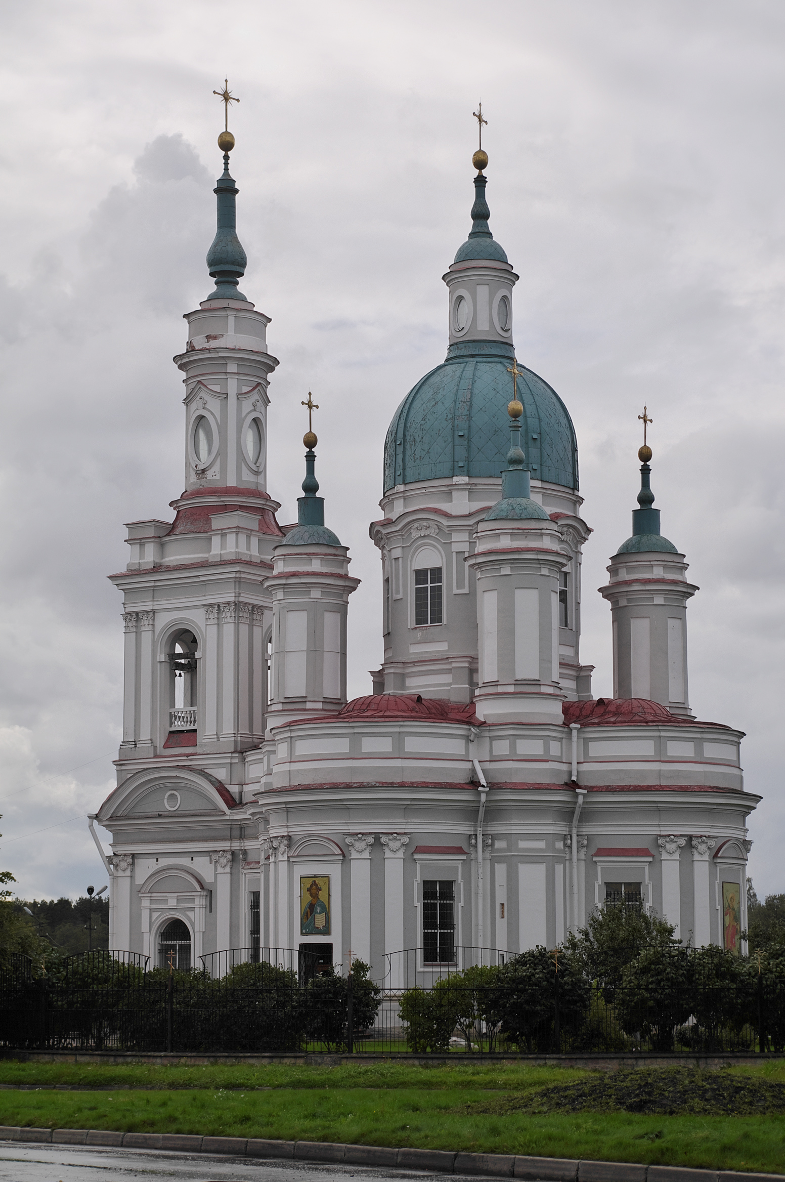 Екатерининский собор, г. Кингисепп, Ленинградская область